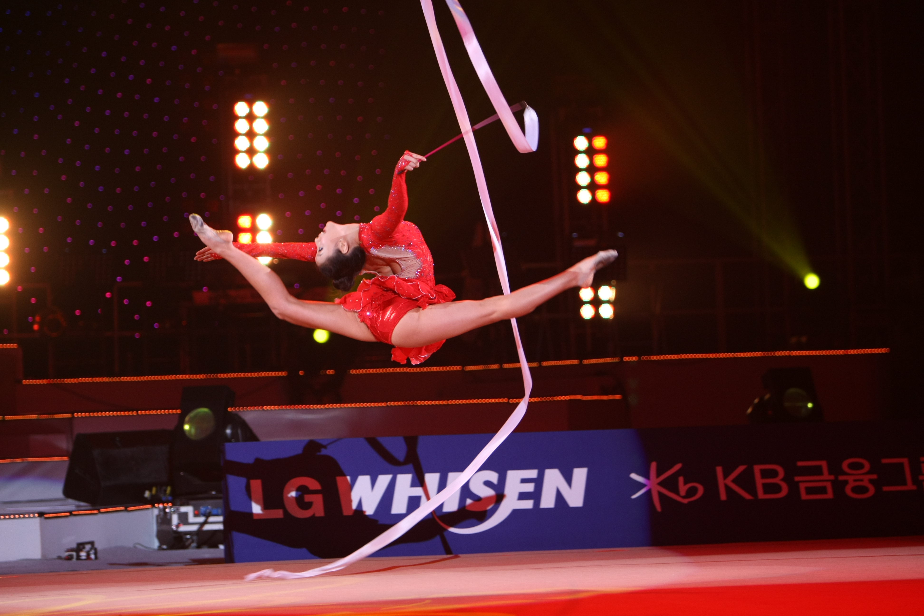 LG전자가 11일(土, 오후 3시), 12일(日, 오후 2시) 양일간 고려대학교 화정체육관 특설무대에서 국내 최초 리듬체조 갈라쇼인 ‘LG WHISEN Rhythmic All Stars 2011’ 행사를 개최했다. 사진은 11일 고려대학교 화정체육관 특설무대에서 열린 ‘LG WHISEN Rhythmic All Stars 2011’ 행사에서 LG ‘휘센’ 광고모델인 손연재(18세, 세종고) 선수를 비롯해 국내외 전•현역 리듬체조 스타들이 총출동해 멋진 리듬체조를 보여줬다.